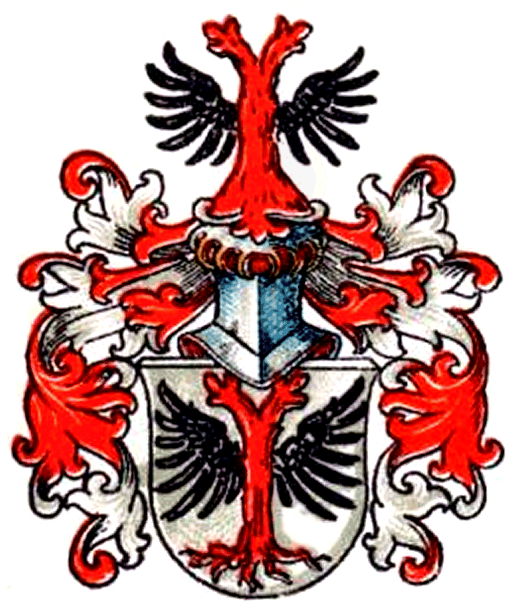 Wappen derer von Lehndorff